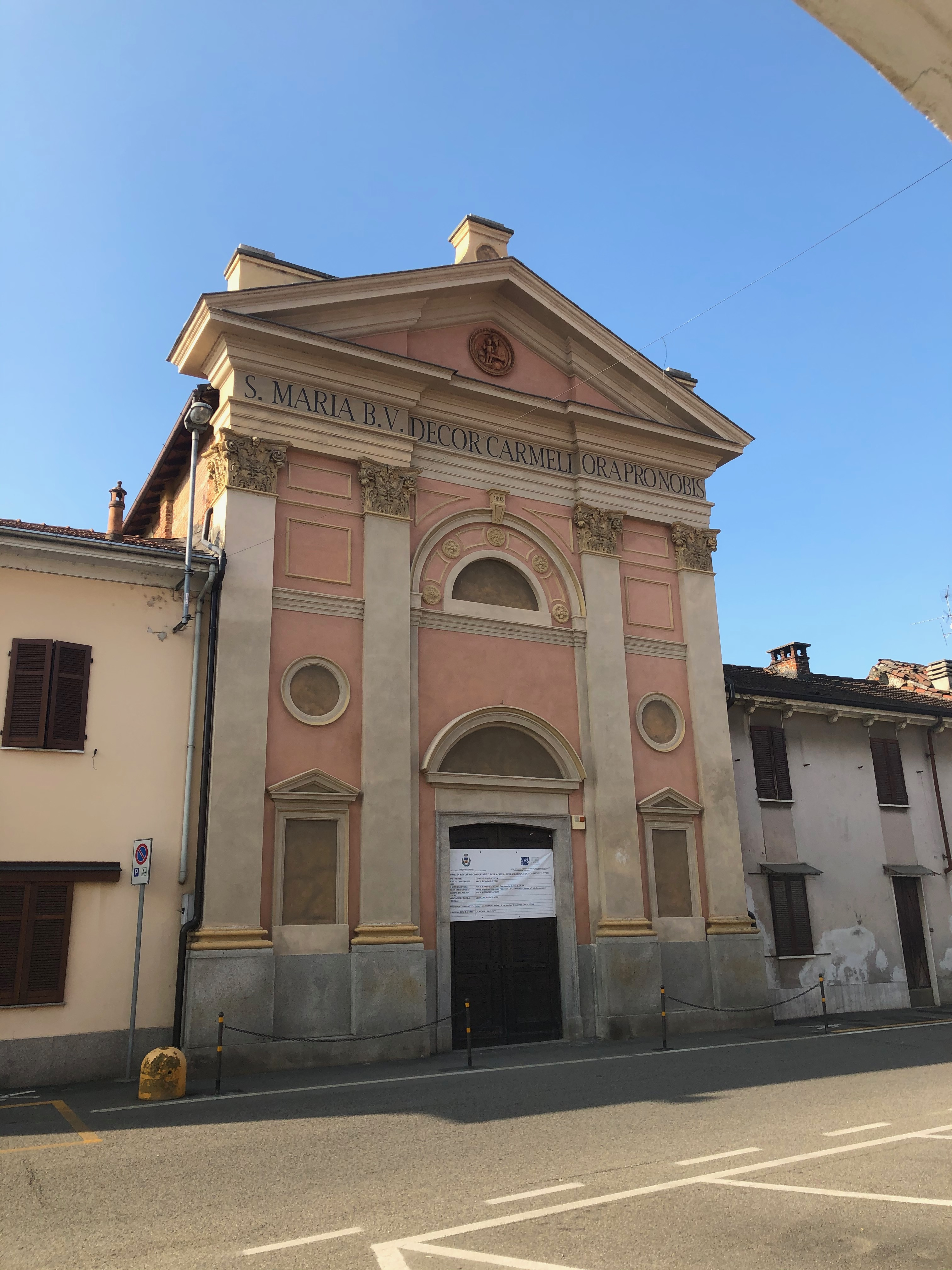 Facciata della chiesa della Beata Vergine del Carmine a Cilavegna